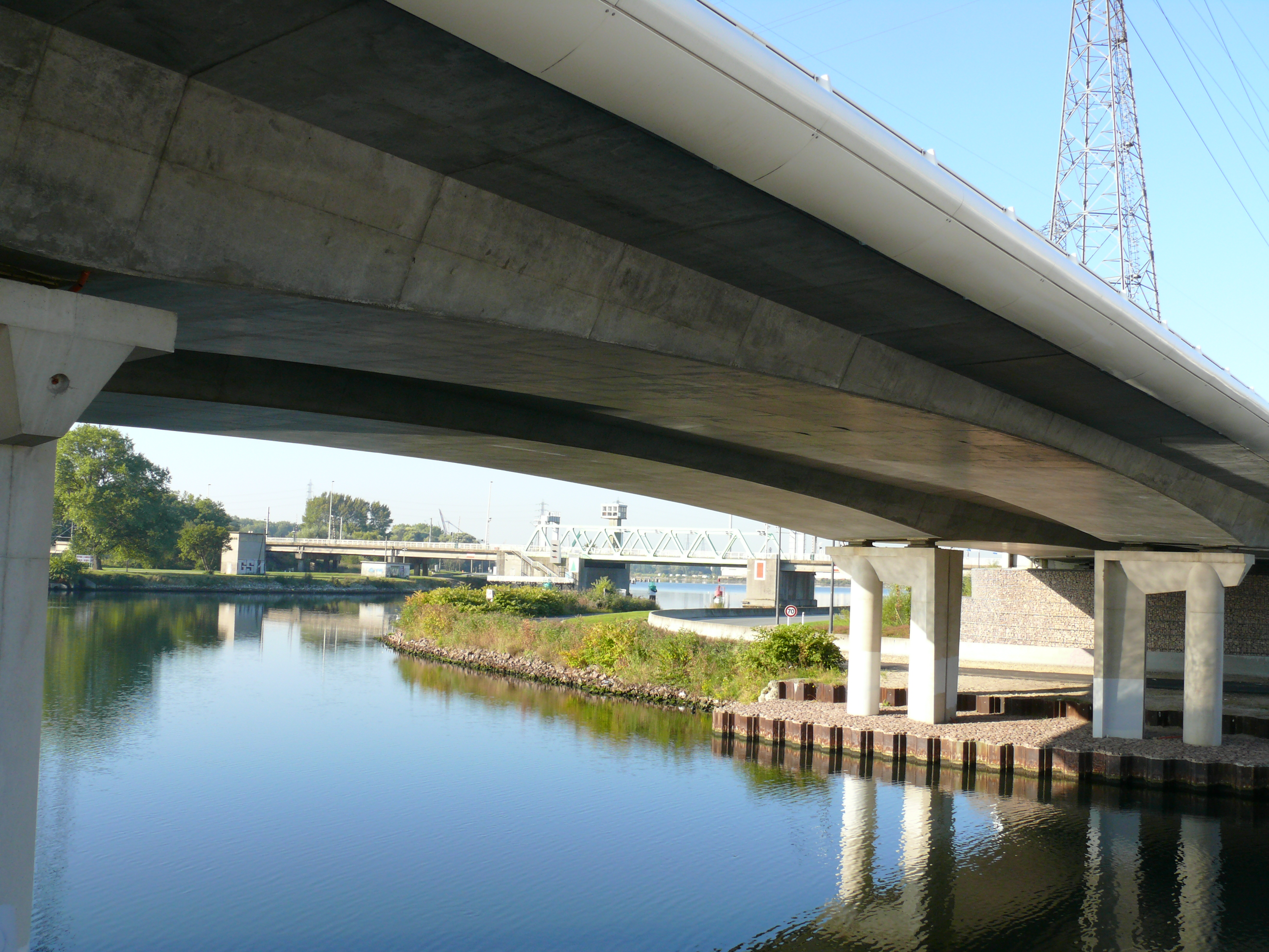 Gonfreville-l'Orcher - Pont de Mayville sur le canal de Tancarville et le pont VIIb